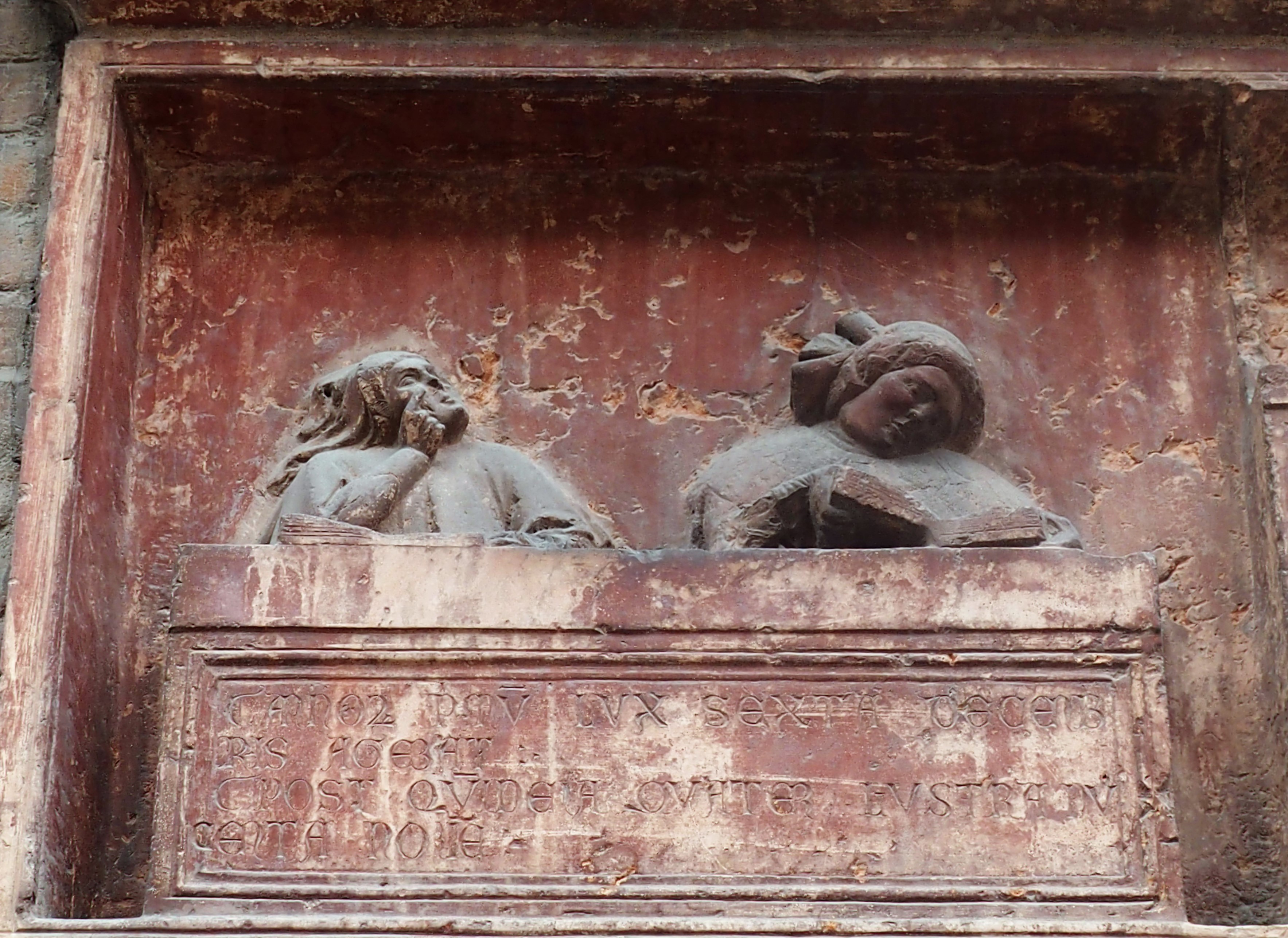 chiesa di San Pietro Martire, lato su via Massalongo, part. della tomba de' Cresenzi. This is a photo of a monument which is part of cultural heritage of Italy.